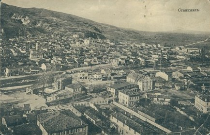 Общ изглед от Станимака (дн. Асеновград).